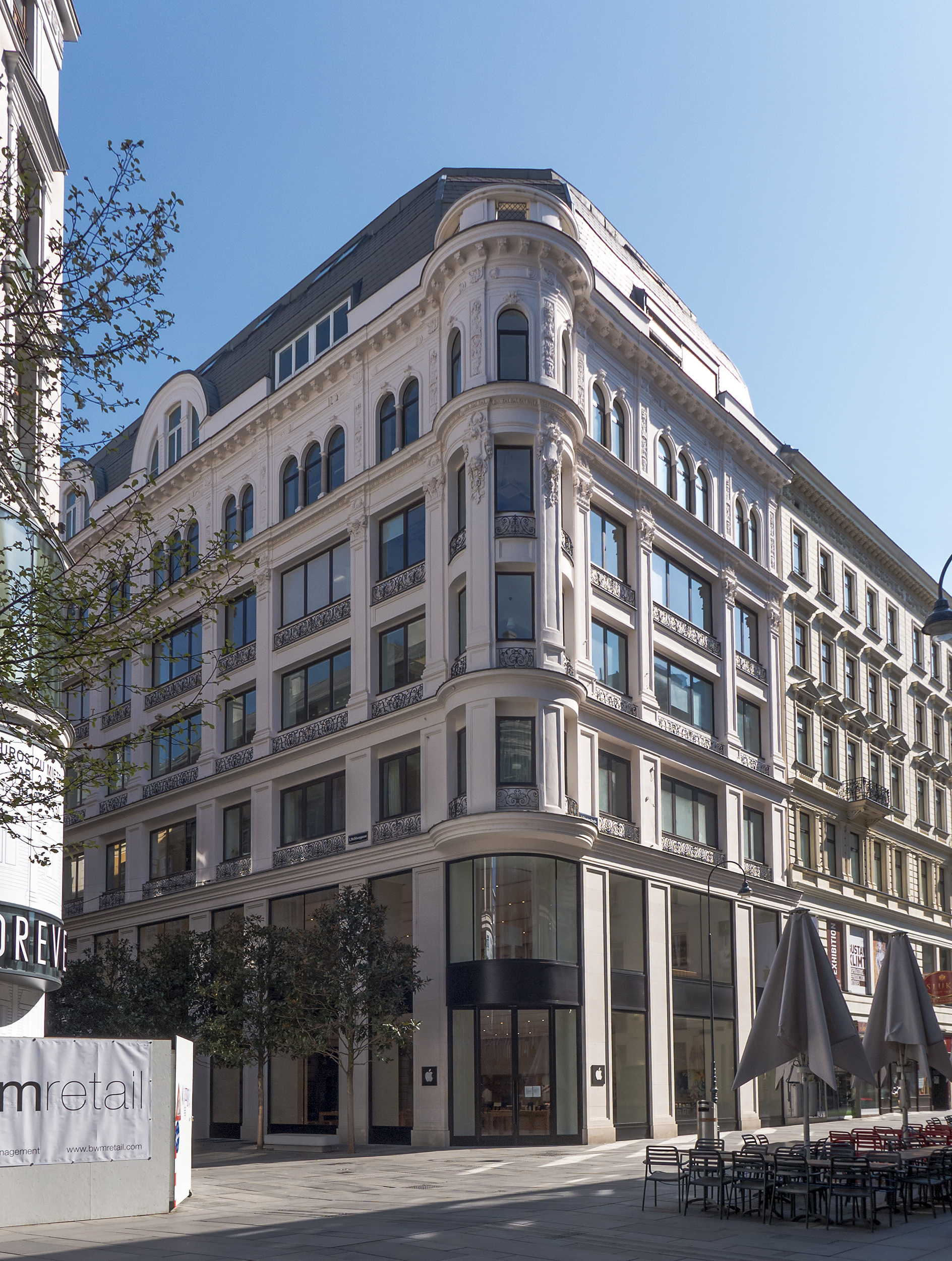 Zwiebackhaus in der Kärntner Straße 11 in Wien 1